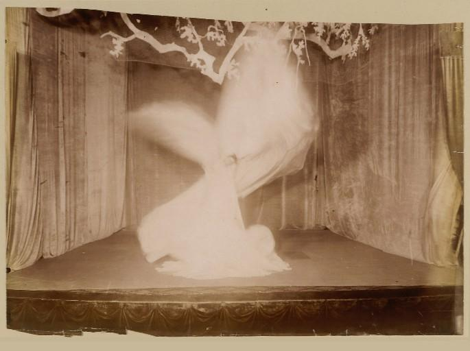 Gallica